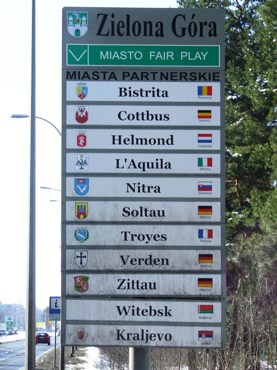 Tablica informacyjna: Miasta Partnerskie Zielonej Góry